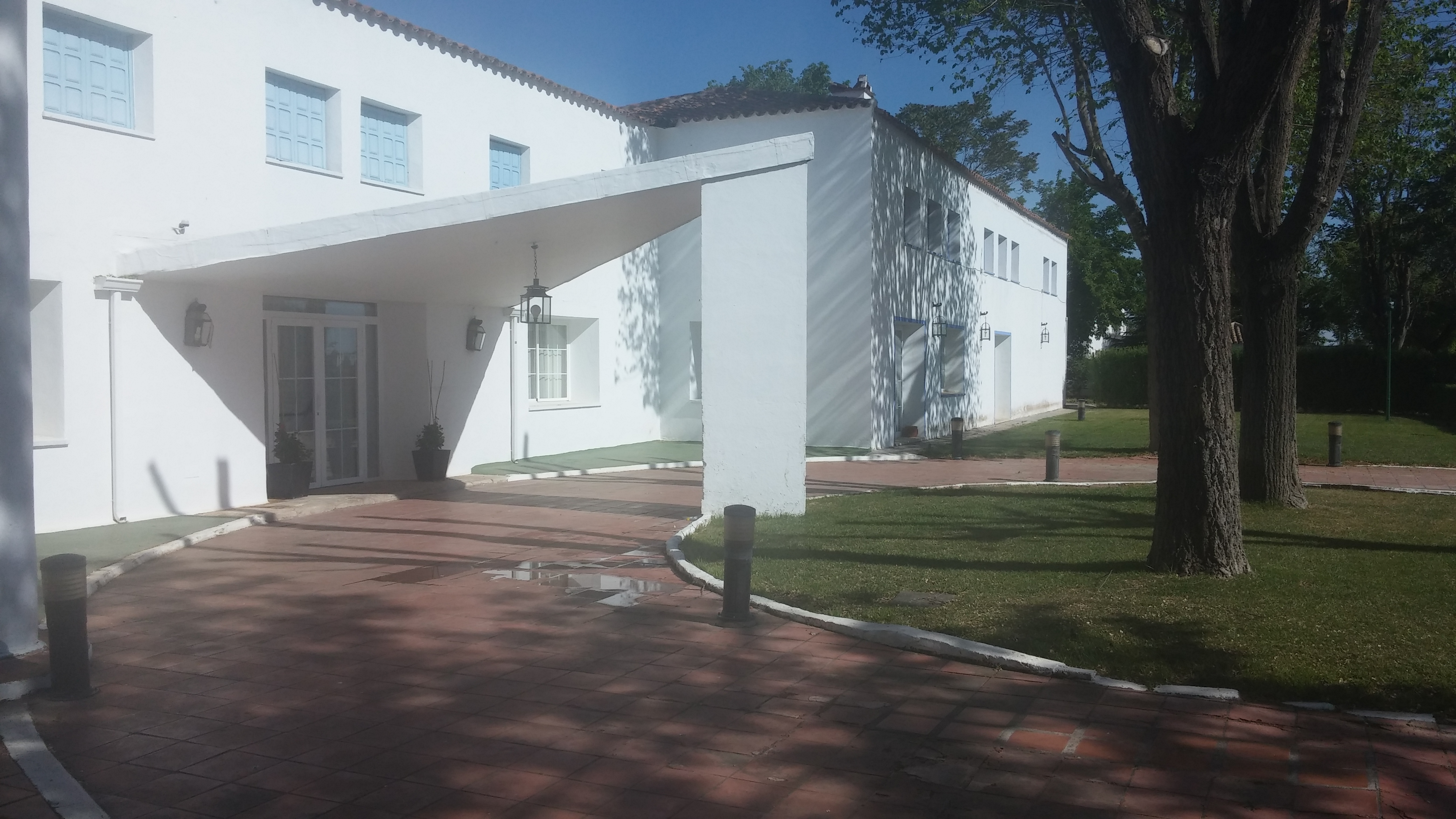 Albergue de Manzanares. Fachada principal. Año 2015. El estado exterior es óptimo aunque se han realizado ligeras modificaciones como cambio de carpintería y luminarias y cegado los ventanucos correspondientes a la cabina telefónica y el aseo, donde ahora se encuentran los apliques a los lados de la entrada. También se ha "rectificado" la forma semicilíndrica de los huecos. Es el actual Parador Nacional de Turismo.